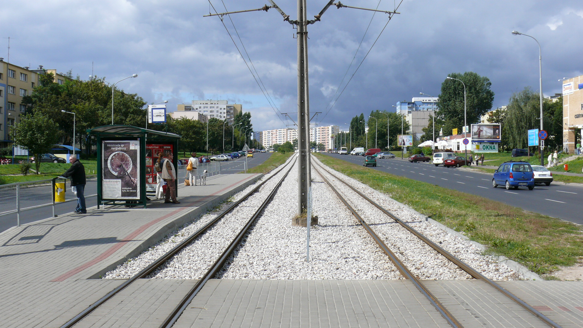 al. Wyszyńskiego w Łodzi